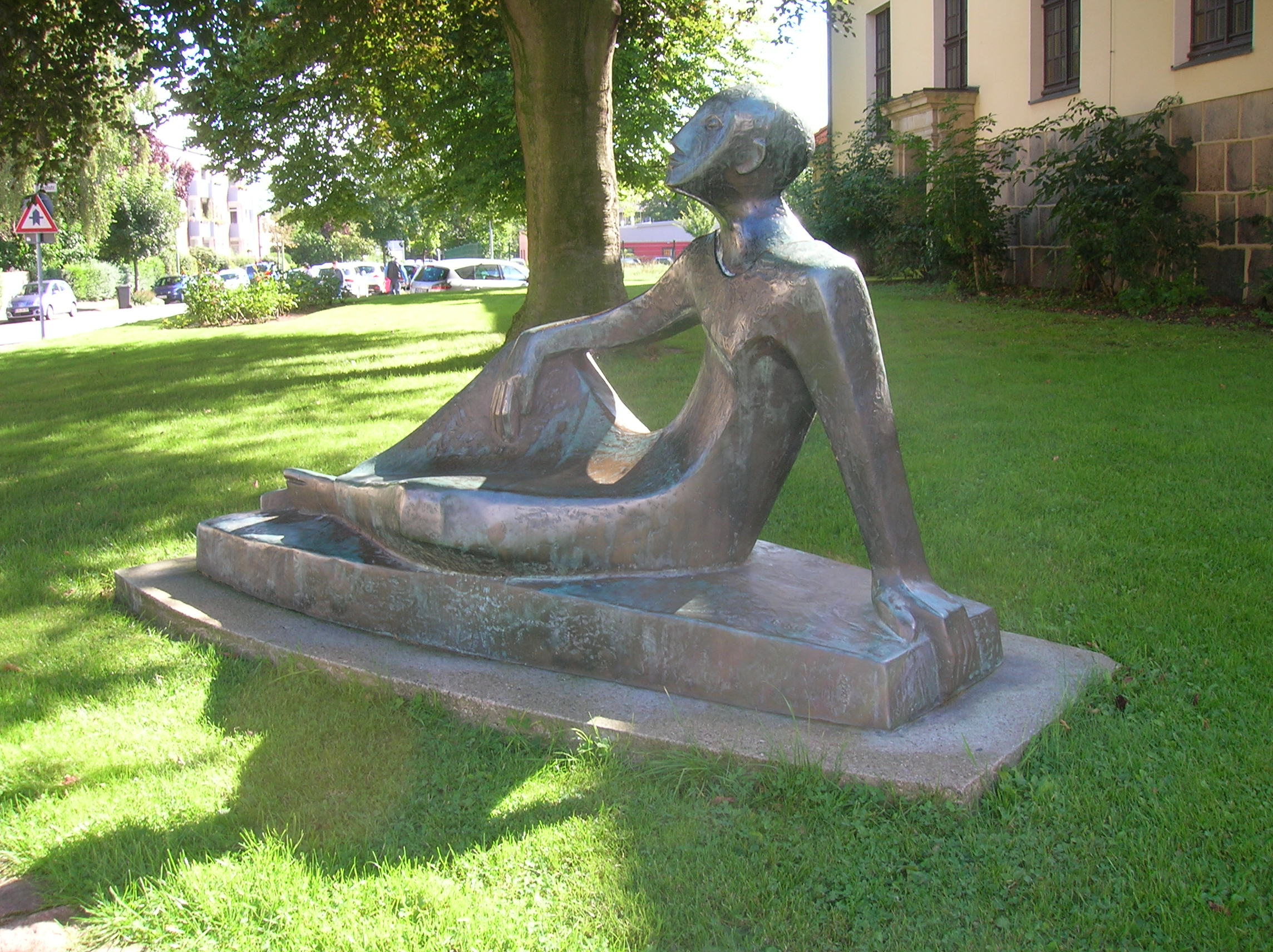 Bronzeplastik „Gottsucher“ von Franz Rotter vor der Dionysiuskirche (Bremerhaven-Lehe)